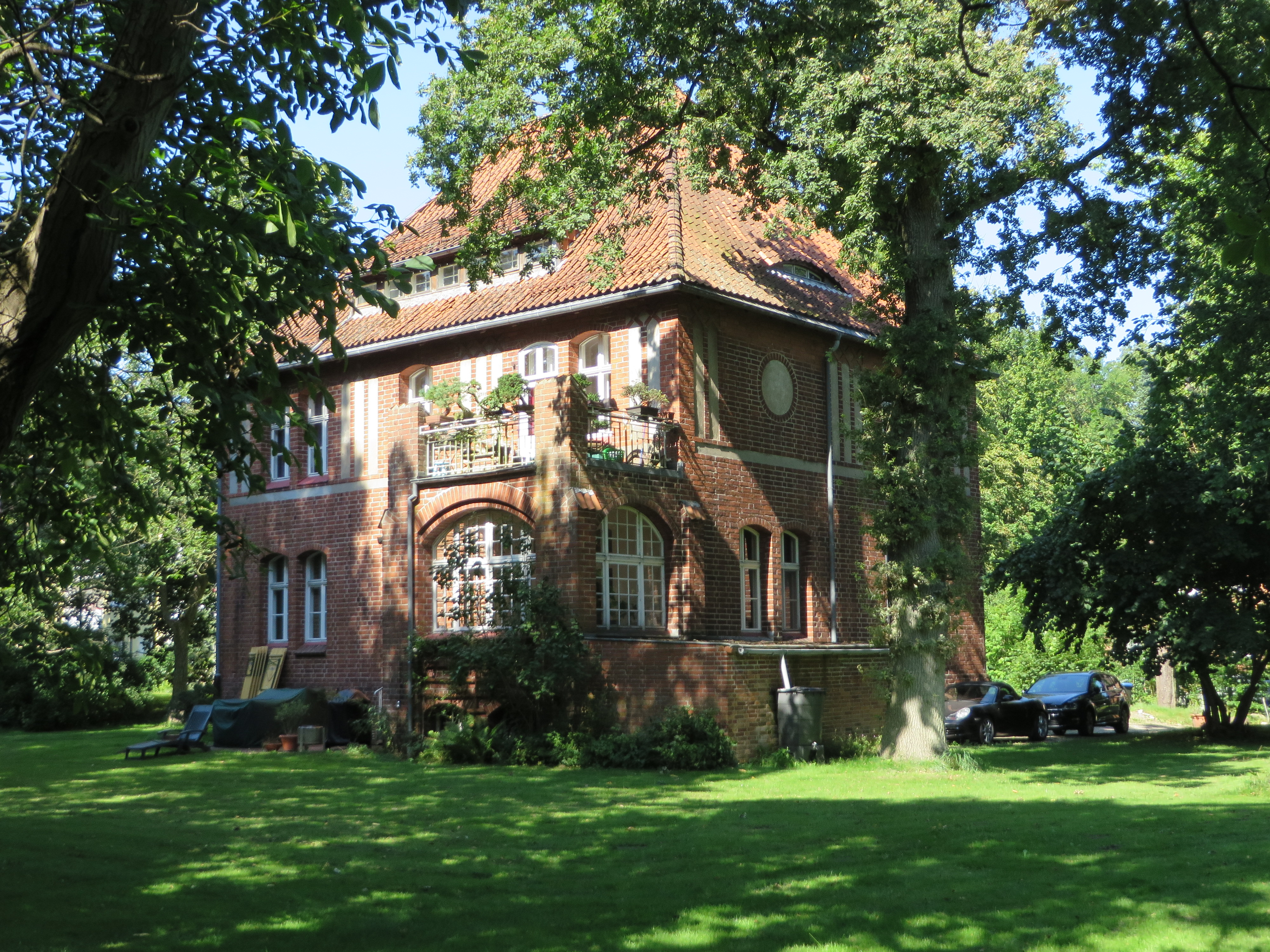 Chefarztvilla (Flensburg-Mürwik August 2015), Bild 04